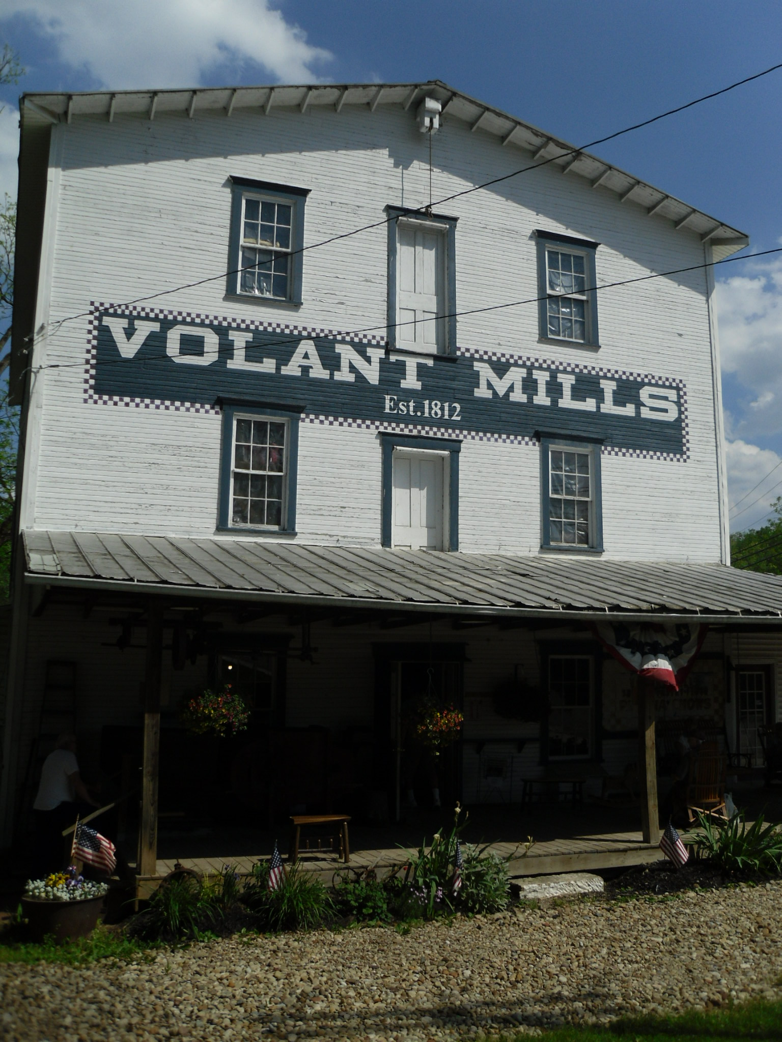 Volant, Pennsylvania